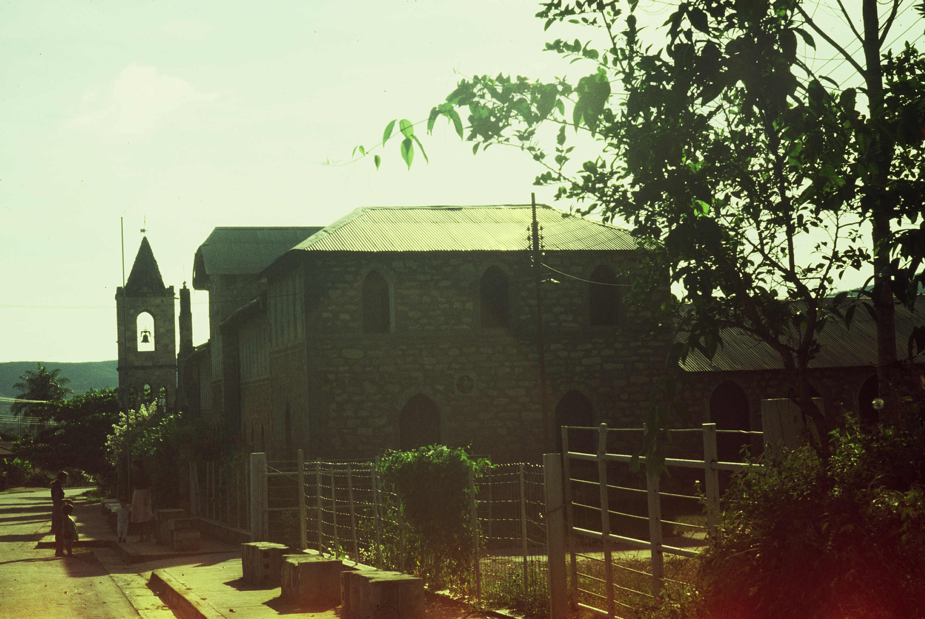 Iglesia de la Misión de Santa Elena de Uairén, estado Bolívar, Venezuela.